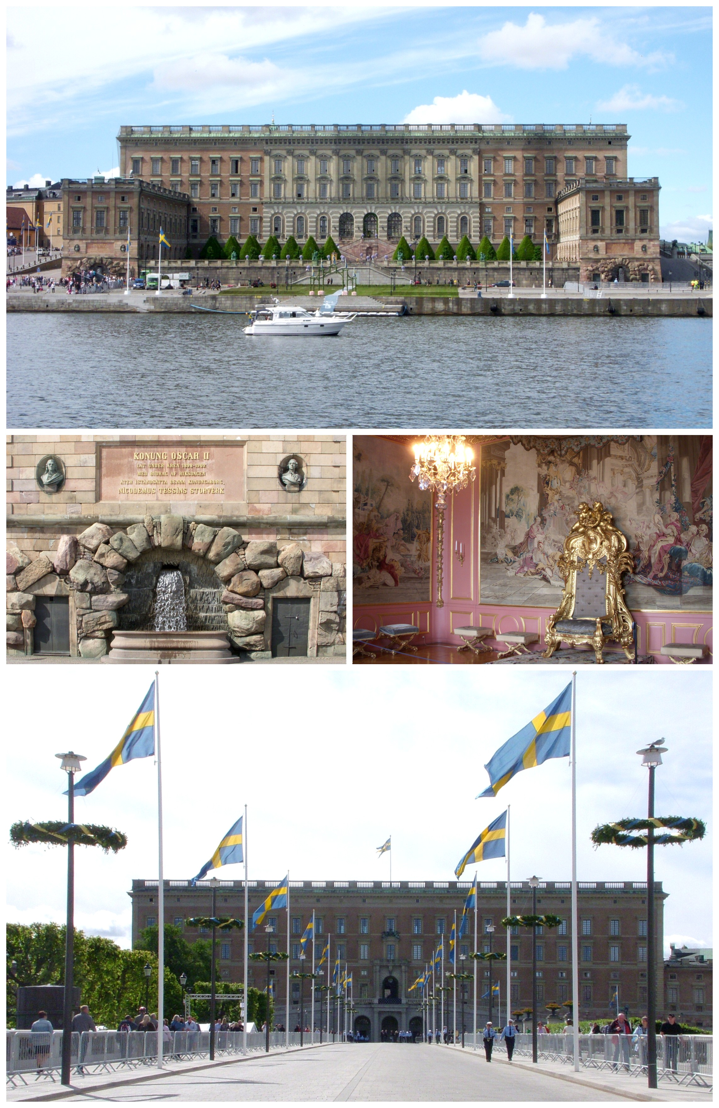 Stockholms slott, kollage: Överst: Fasad mot öst Mitten: Brunn på gavel på sydöstra flygeln (vänster) och Lovisa Ulrikas audiensrum Nederst: Fasad mot norr